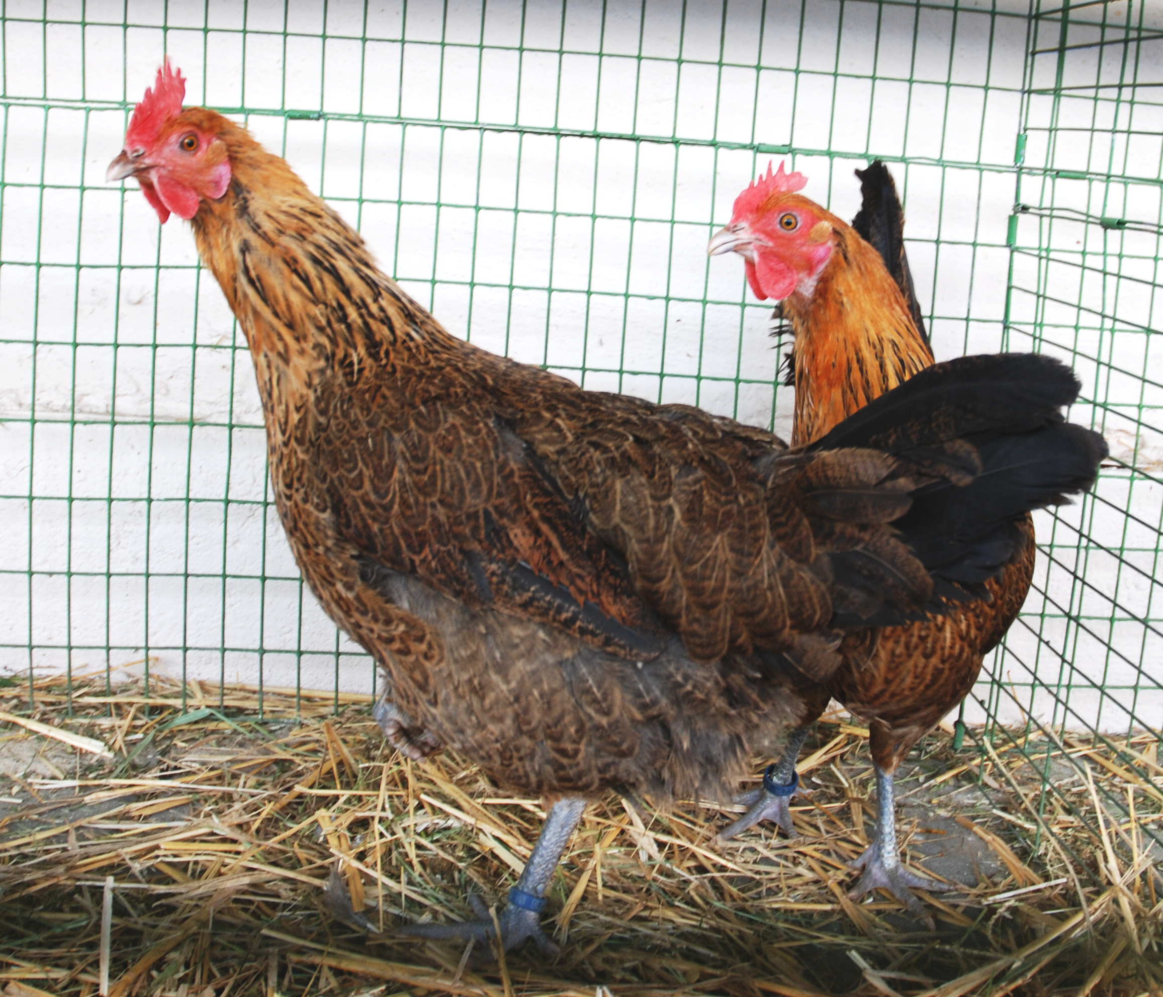 české slepice zlatě kropenaté